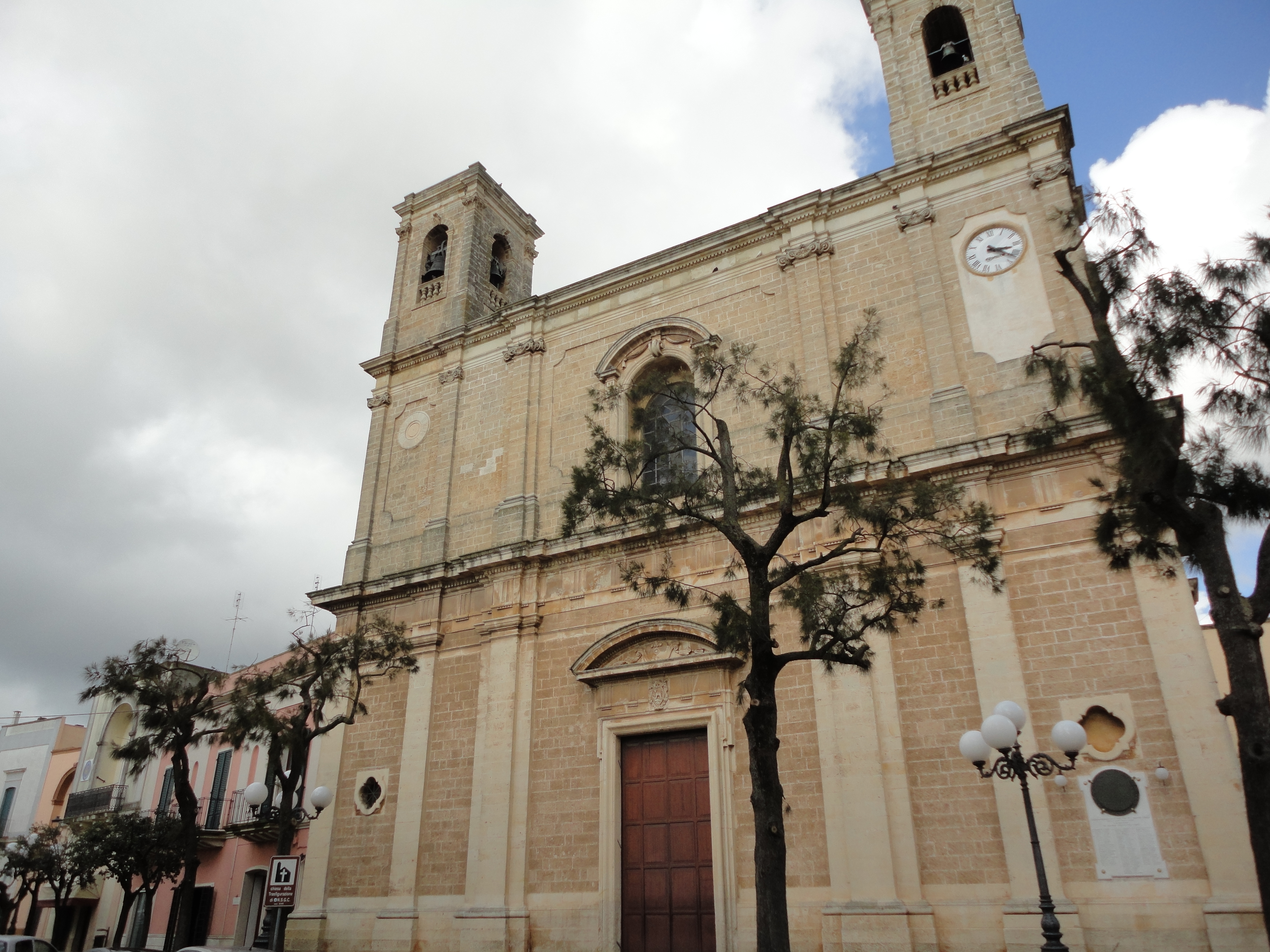 Chiesa Madre di Taurisano, Lecce